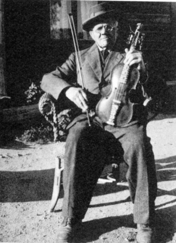 Gunnar Olavsson Helland (1852-1938).